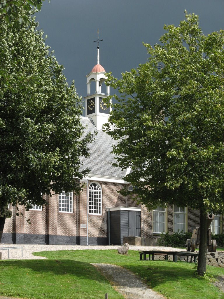 Schokland